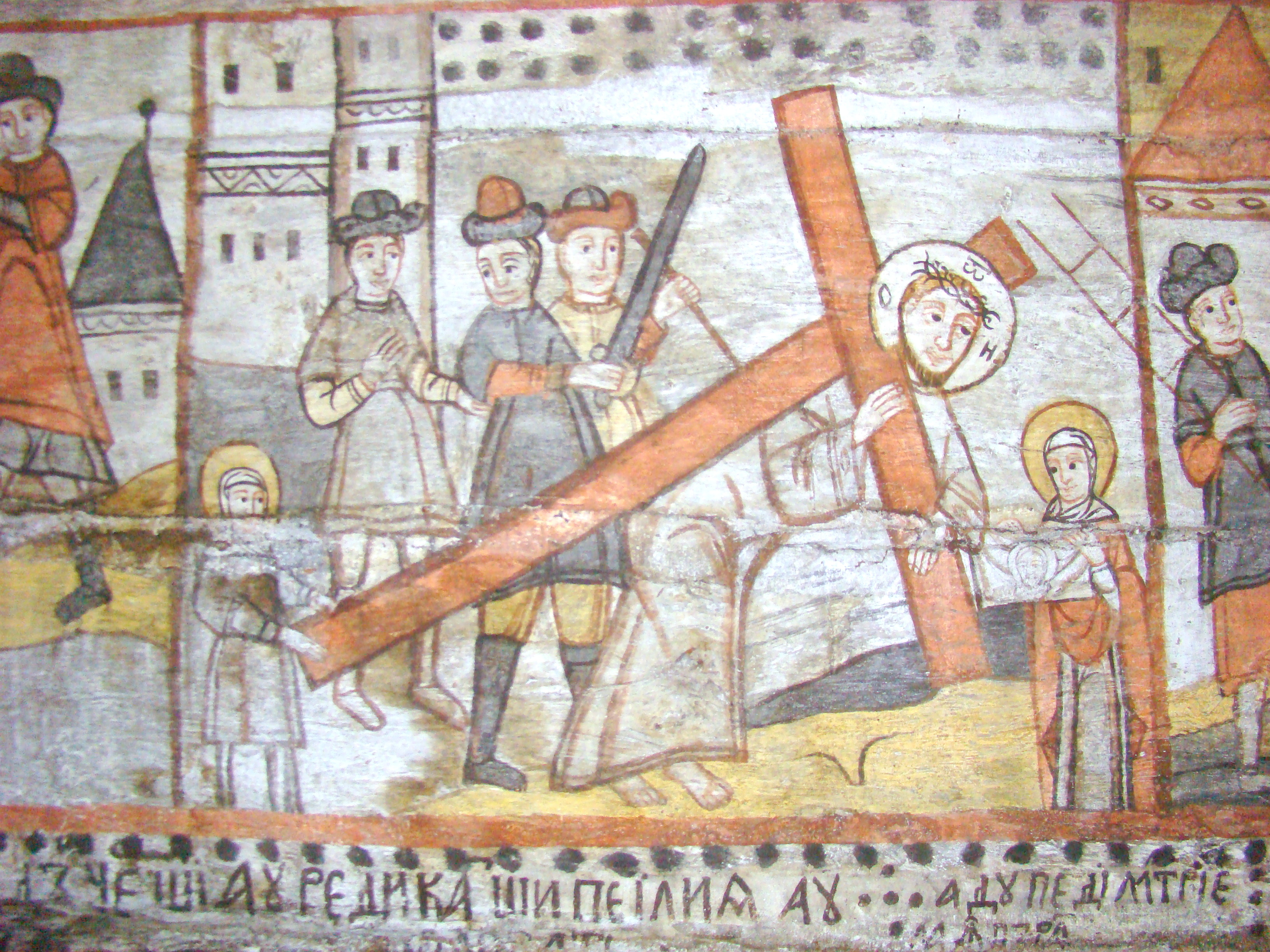 Biserica de lemn „Nașterea Maicii Domnului” din Călinești-Căeni, județul Maramureș